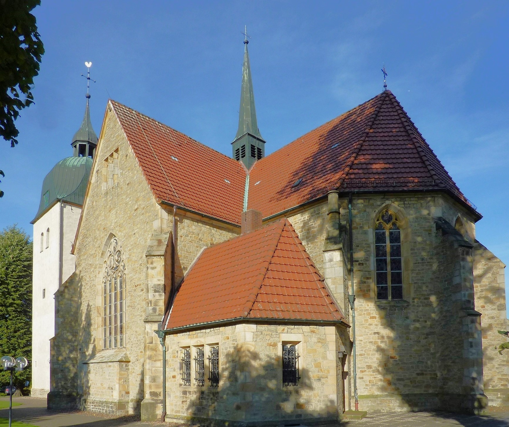 St. Johannis (Riemsloh)